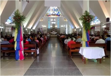 Interior dela Santa Iglesia